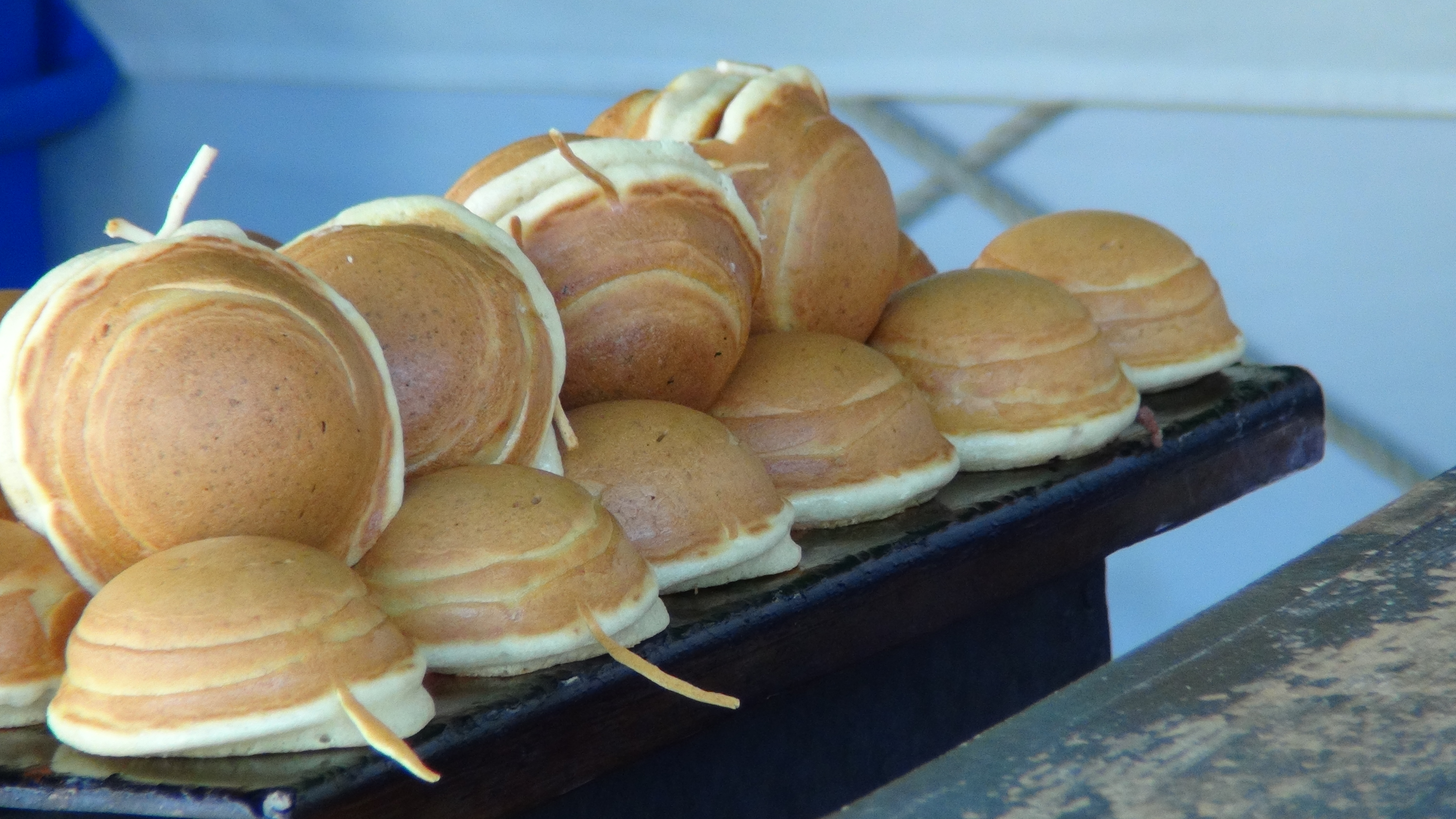 元祖 岡田屋パンヂュウさんへ行って買った時のものです。寒い中ホッカホカのパンヂュウが食べられて幸せでした。